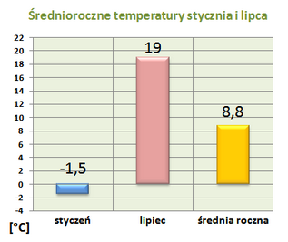 Wykres przedstawiający średnioroczne temperatury dla okolic Środy Wielkopolskiej